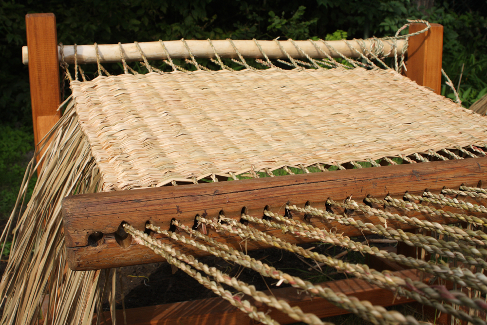 Gyékényszövés a sarródi tájházban (Győr-Moson-Sopron megye)